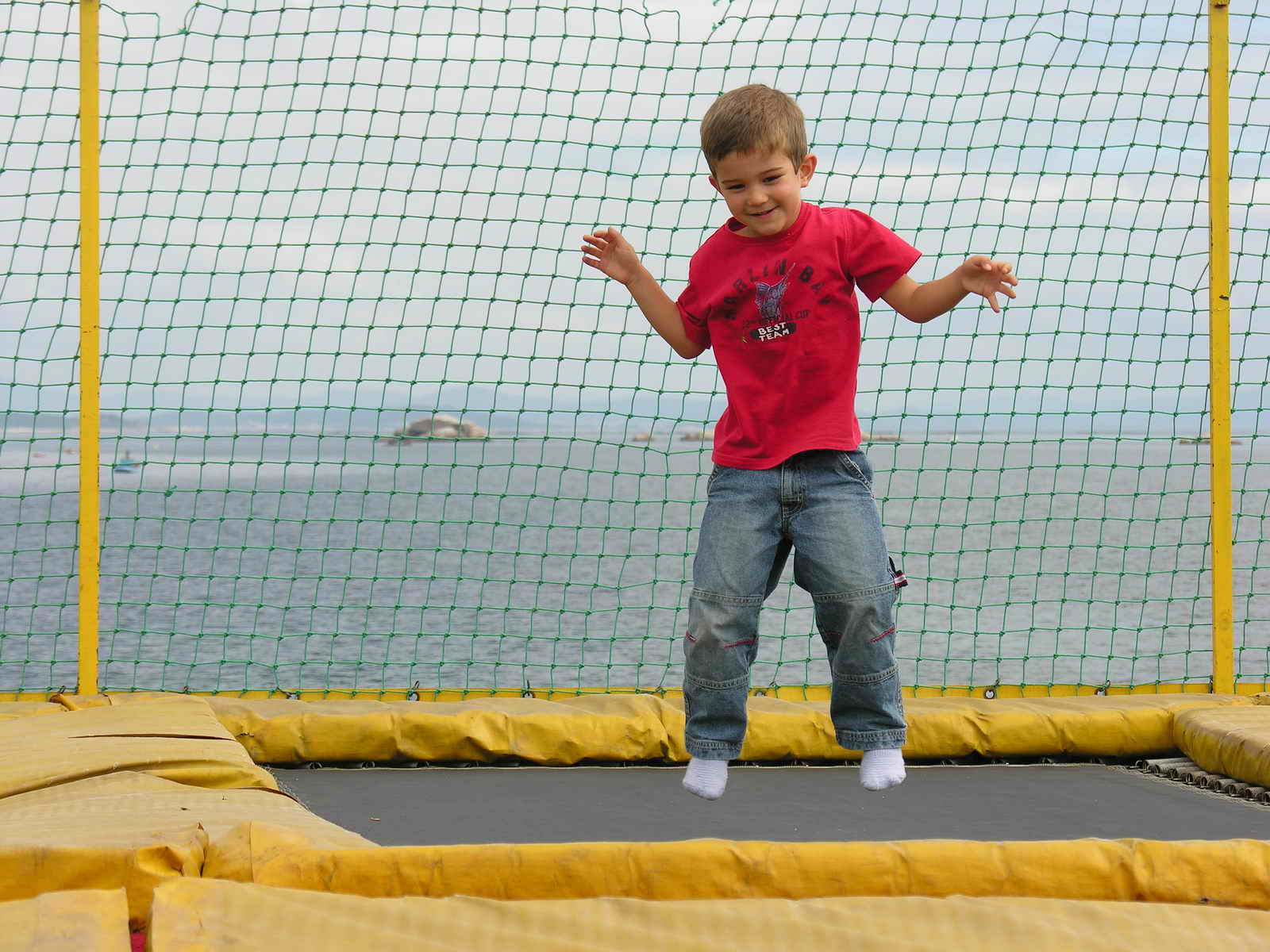 A forza do salto supera a da gravidade. Gravity